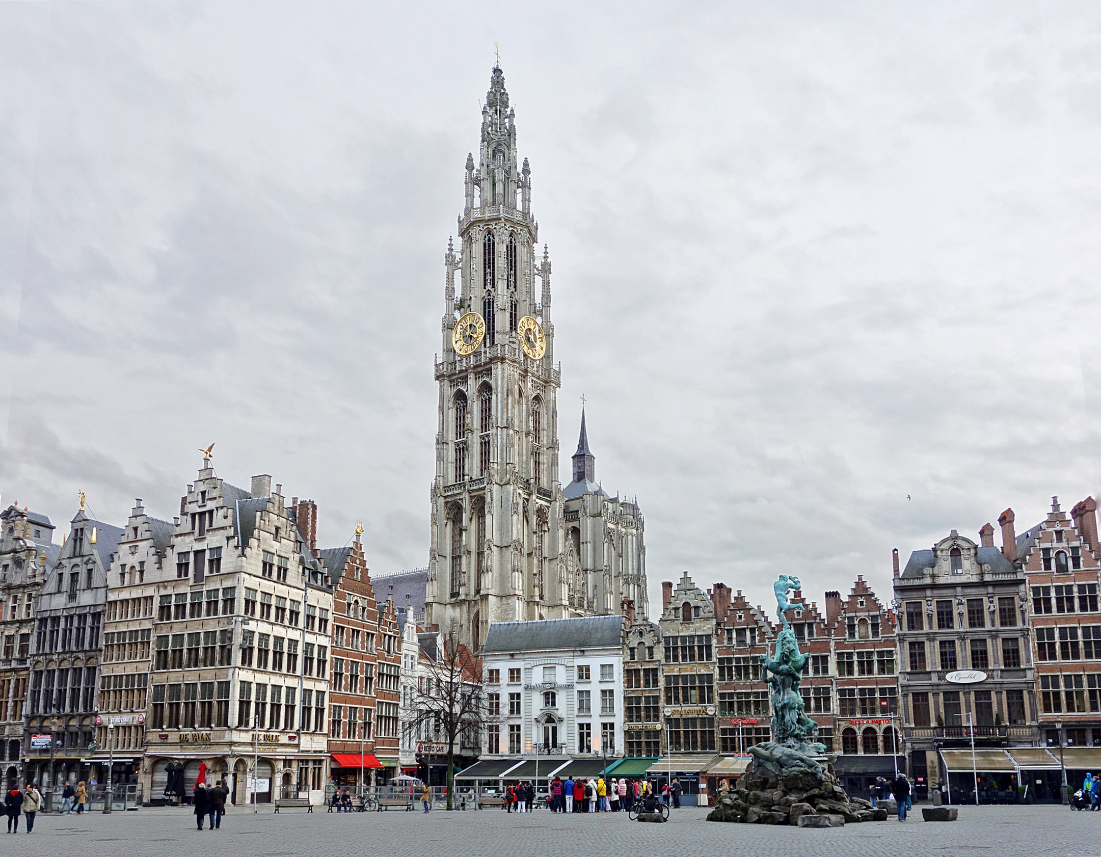 La Cathédrale Notre-Dame d'Anvers vue depuis la Grand Place.